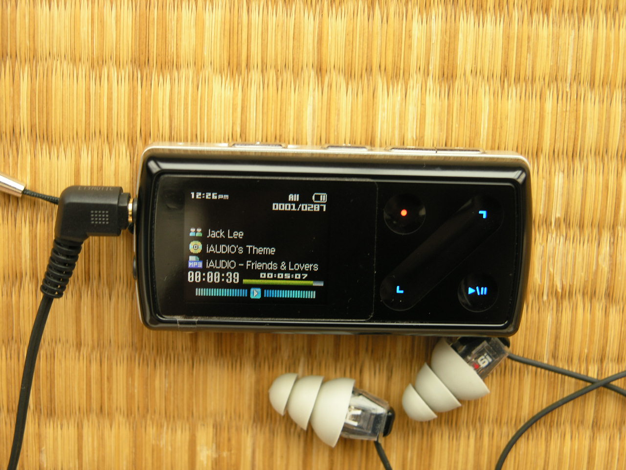 iAUDIO7 2008年8月撮影。 機材：C8080WZ 撮影者：Kansai explorer